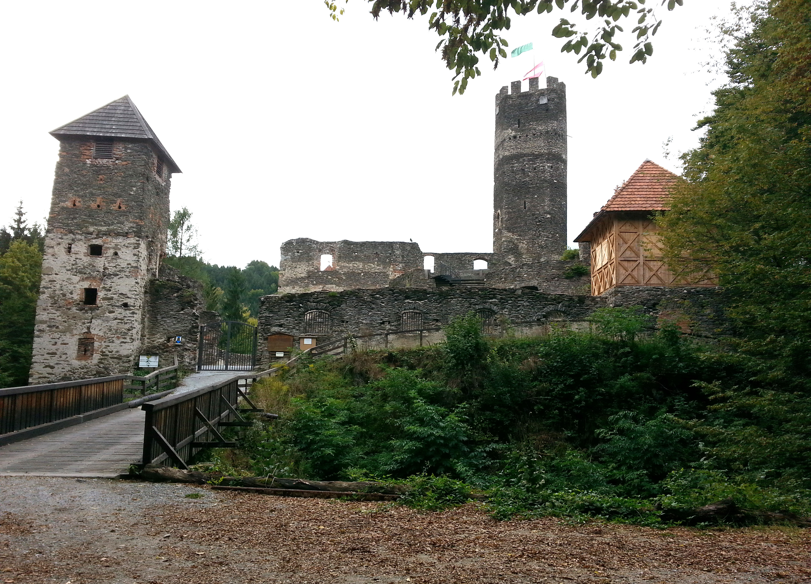 Burgruine Krems